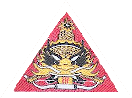 The Insignia of ARVN Presidential Guards Unit, used since 1961 to 1975.